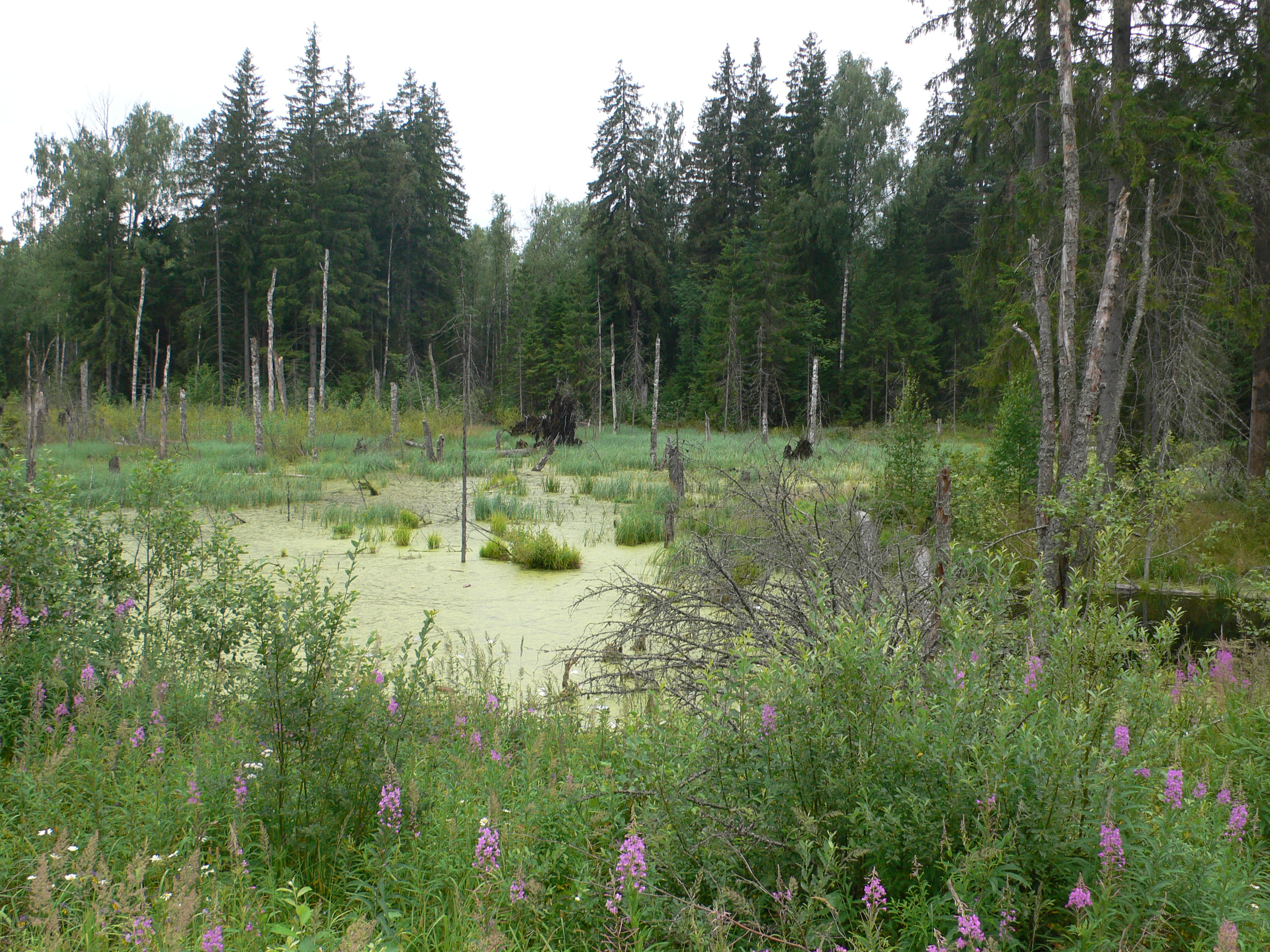 Болото на Селигере